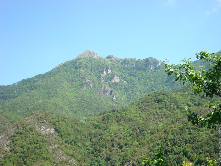 Francesco Stuppello, Tortora, monte Serramale